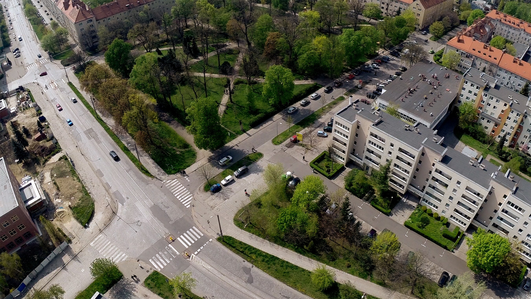 Wrocław: skrzyżowanie ulicy Gajowickiej (z torami tramwajowymi w jezdni, z lewego górnego rogu kadru w prawo w dół) z ulicą Pretficza. Zielony obszar w centrum zdjęcia to park Gajowicki (do 1958 cmentarz), od 2013 pod nazwą park generała Mariana Langiewicza.